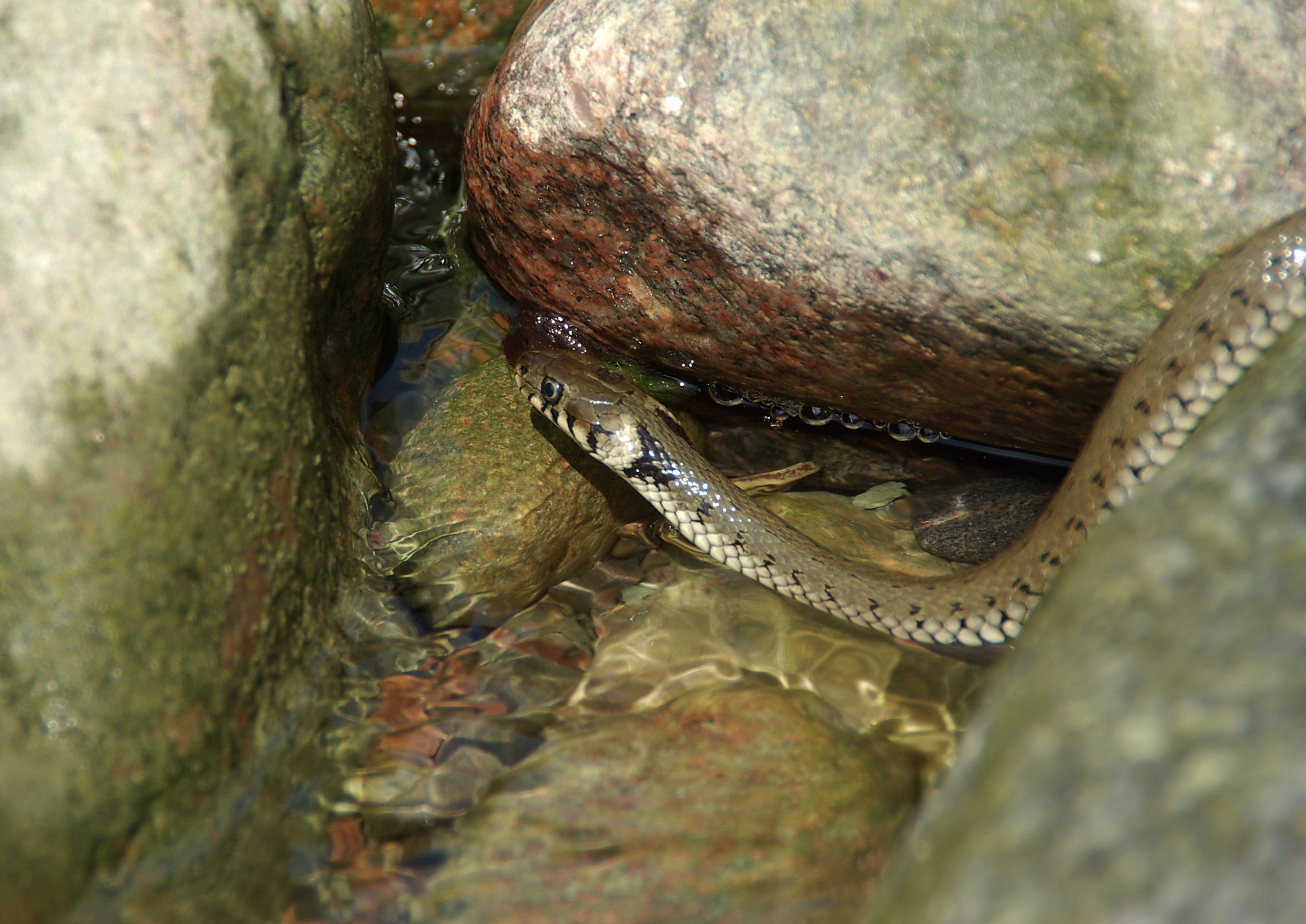 Nastik on tumehalli, pruuni või isegi musta värvi selja ning valge kõhualusega madu, kelle pikkus võib ulatuda 150 cm-ni. Isased on emastest kuni poole lühemad - vaid kuni 70 cm. Nastiku peamiseks tunnuseks peetakse heledaid laike kukla piirkonnas, mis on tavaliselt kollased, kuid võivad olla ka oranzid, hallikad või valged.Loomult on nastik aktiivne ja liikuv madu - ta roomab kiiresti, võib ronida ka puudel ja ujuda vee all. Nastik on hea ujuja - ta võib ujuda kaldast mitme kilomeetri kaugusele ning sukelduda mitmekümneks minutiks.